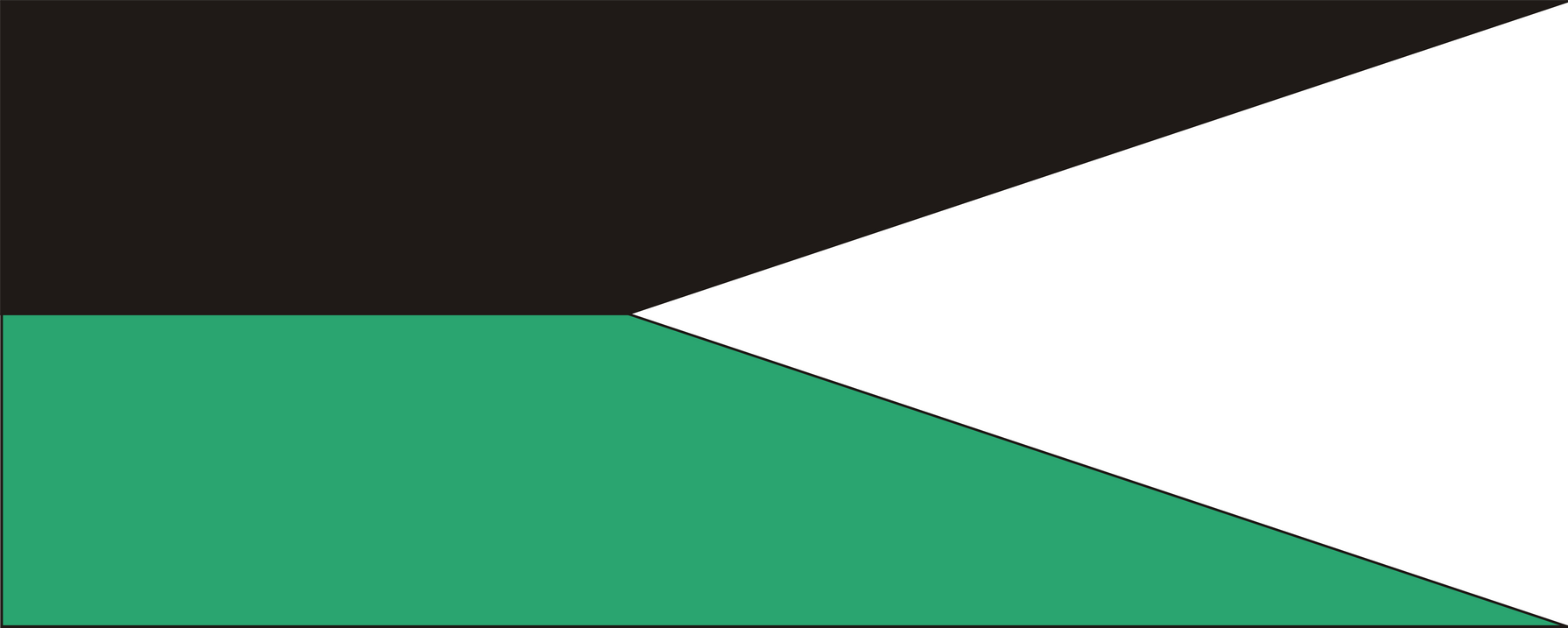 Proporczyk 1 i 2 Pułków Artylerii Motorowej Polskich Sił Zbrojnych na Zachodzie